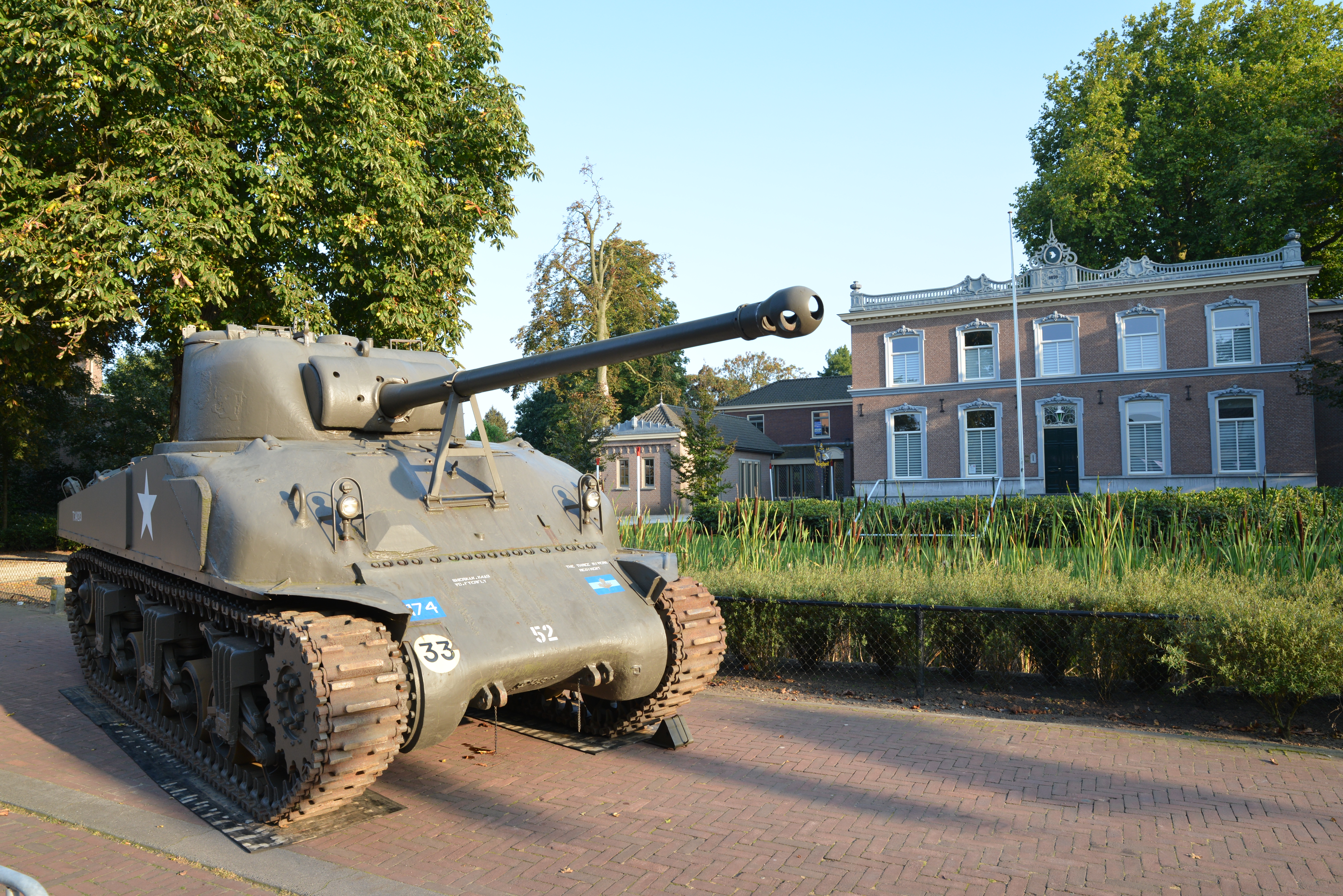 Voormalig hoofdkwartier van het 501st Parachute Infantry Regiment (101st Airborne Division) 'Villa Klondike' tijdens de herdenking van Operation Market Garden in Veghel, 2014. De villa stond voor de Tweede Wereldoorlog bekend als 'Huize Rustplaats'.